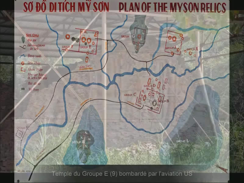 Le site de My Son se situe à une trentaine de kilomètres de la ville de Hoi An au centre du Vietnam. Il s'agit de l'un des lieux les plus importants de l'ancien royaume Champa. Le site a été étudié par des scientifiques de l'Ecole Française d'Extrême Orient (EFEO) : Henri Parmentier (1871-1949) et ses successeurs. Bien que très endommagé, My Son, construit à partir du 7ème siècle, demeure un site historique, classé au patrimoine mondial par l'UNESCO. Ce site, sacré pour les Cham, comprend environ 70 ouvrages architecturaux de briques et de pierres au cœur d'une nature foisonnante. Ces édifices étaient tous ornés de frises sculptées et autres décors, propres à l’art Cham. Les oeuvres majeures sont présentées au musée Cham de Da Nang. Le temple Cham ou Kalan est probablement une représentation symbolique de Sikhara, le sommet de la montagne sacrée des Cham, appelé mont Meru dans le brahmanisme. Le mont Meru est la montagne mythique considérée comme l'axe du monde dans la mythologie hindoue. L'objet de culte dans les temples principaux de My Son est le linga, symbole de Shiva - protecteur des rois Cham. Le site, proche de la piste Ho Chi Minh, a été en grande partie détruit par des bombardements américains durant la guerre.